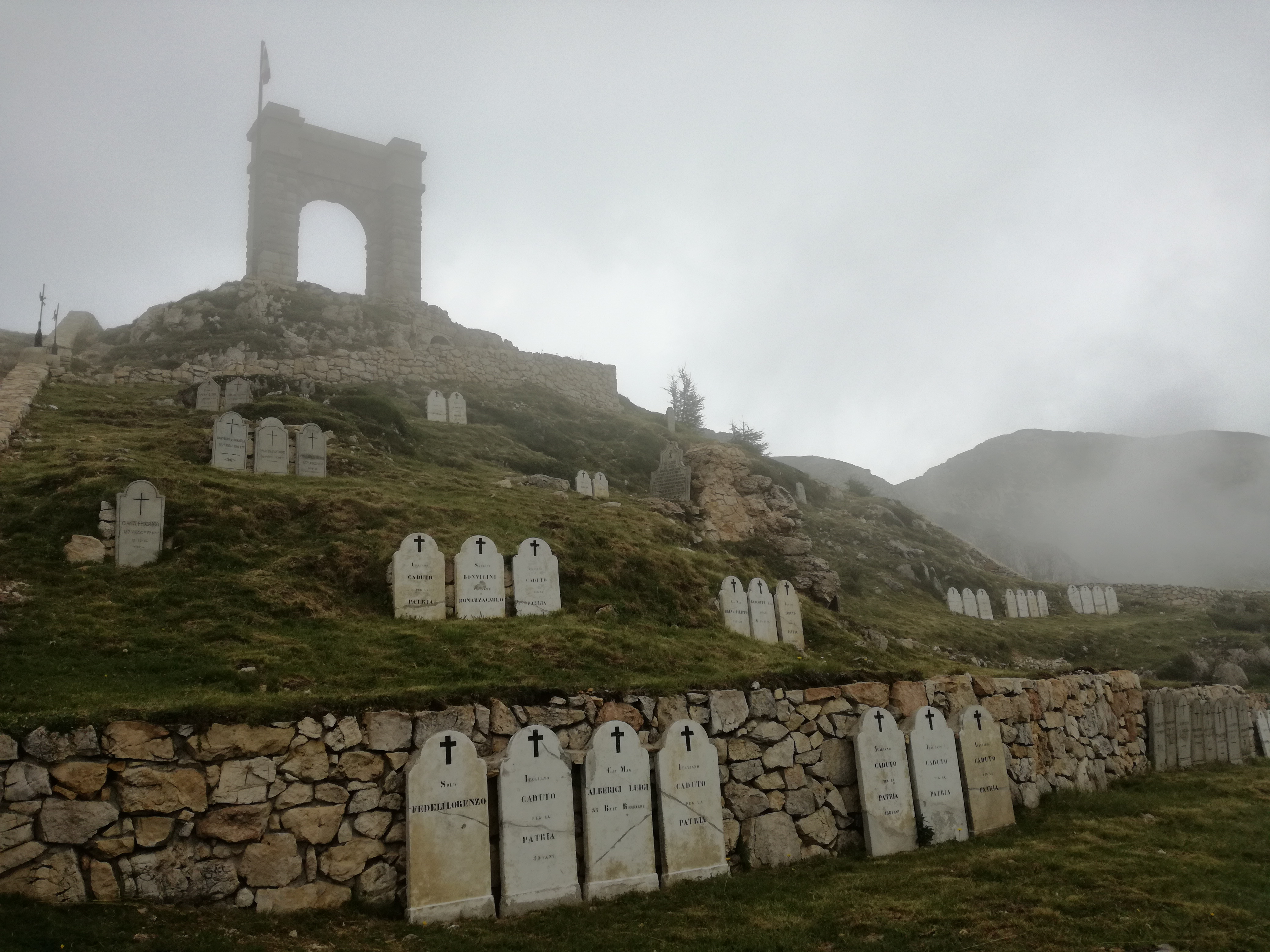 italienischer Soldatenfriedhof der Brigate Liguria – Pasubio